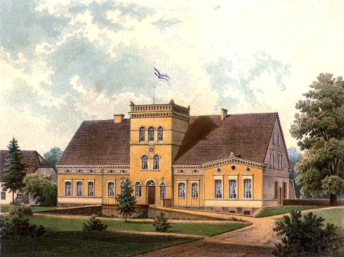 Rittergut Schmenzin, Kreis Belgard, Provinz Pommern; heute Smęcino (deutsch Schmenzin) ist ein Dorf in der polnischen Woiwodschaft Westpommern. Es gehört zur Gemeinde Tychowo (Groß Tychow) im Kreis Białogard (Belgard). Das Schmenziner Schloss wurde 1854 bis 1856 als Gutshaus unter Theodor von Kleist erbaut. Prägend war der turmartige Mittelteil. Graf Adolf von Kleist hat um 1870 noch einen Flügel angebaut. Das Gebäude wurde 1945 ausgeplündert, blieb aber zunächst stehen. Letzter Eigentümer war Ewald von Kleist-Schmenzin. In polnischer Zeit war im Schloss die Verwaltung eines Staatsbetriebes untergebracht. Jetzt dem Verfall preisgegeben.